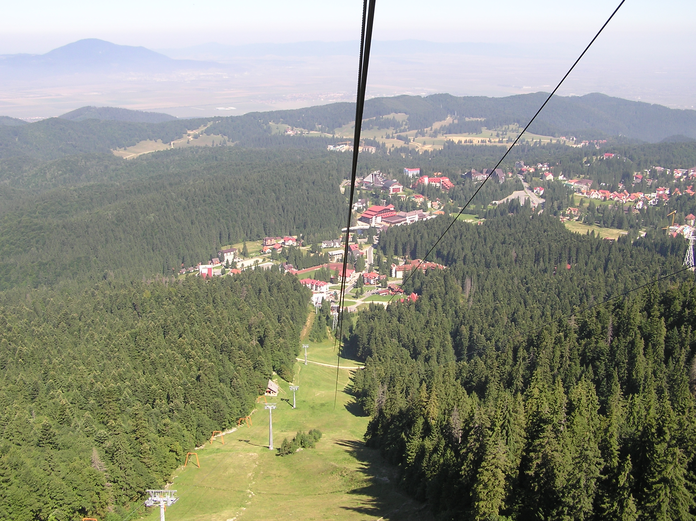 Sicht auf die Poiana Brașov / Schulerau, Siebenbürgen, Rumänien.